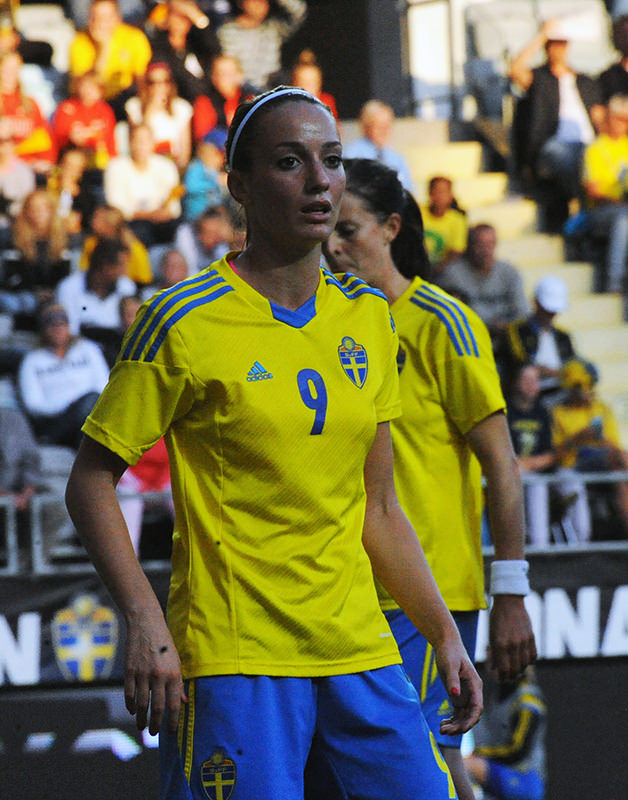 a_39_1732